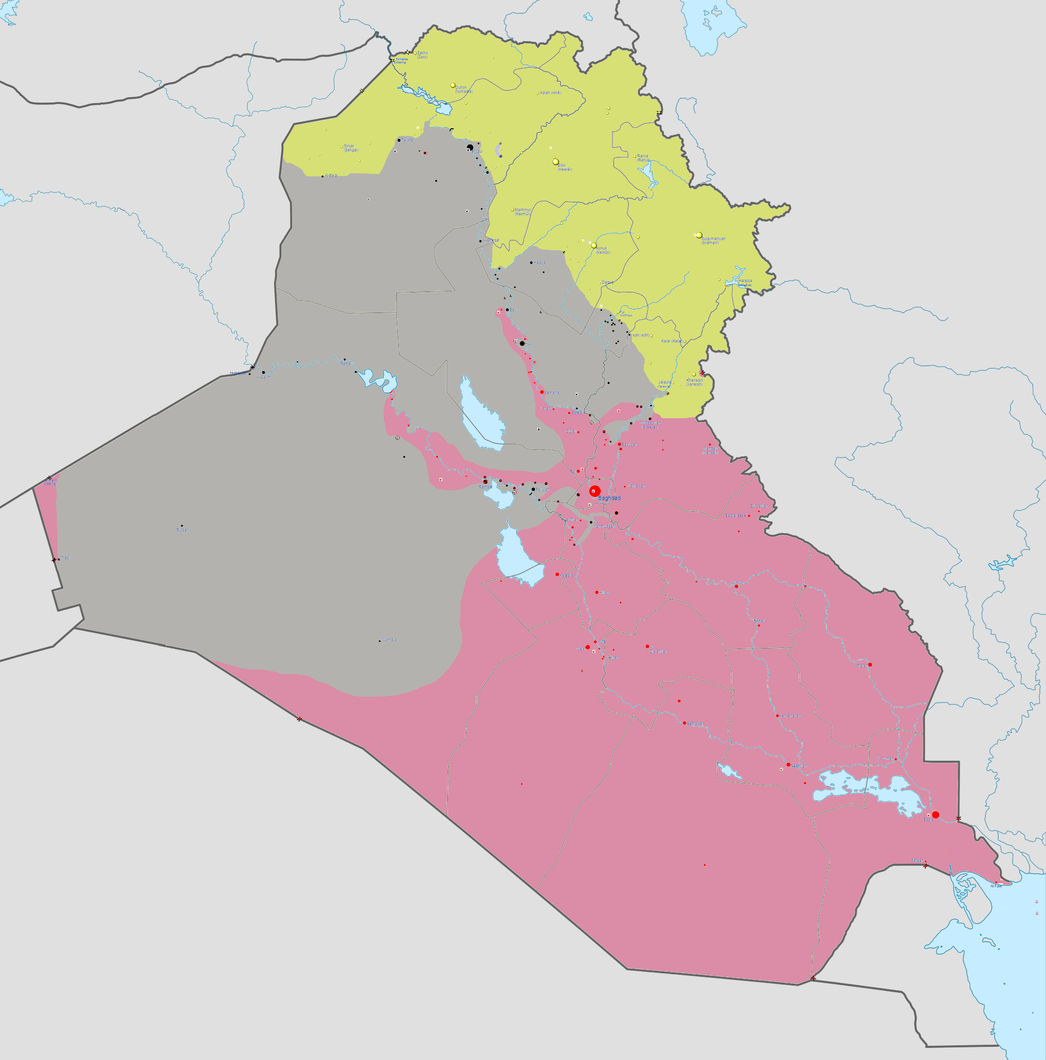 Carte de l'Irak, le 1er août 2014.